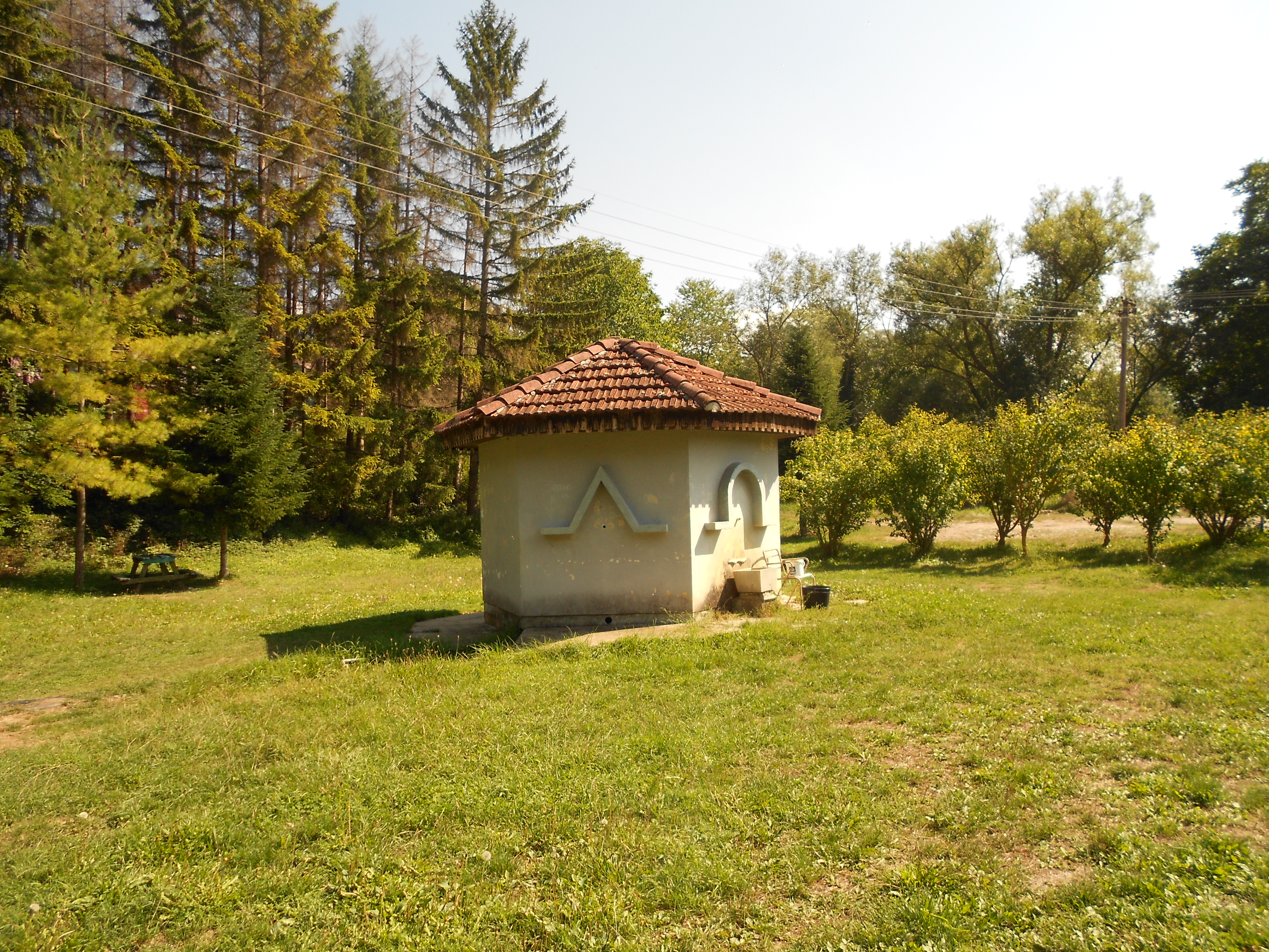 Извор у Јошаници